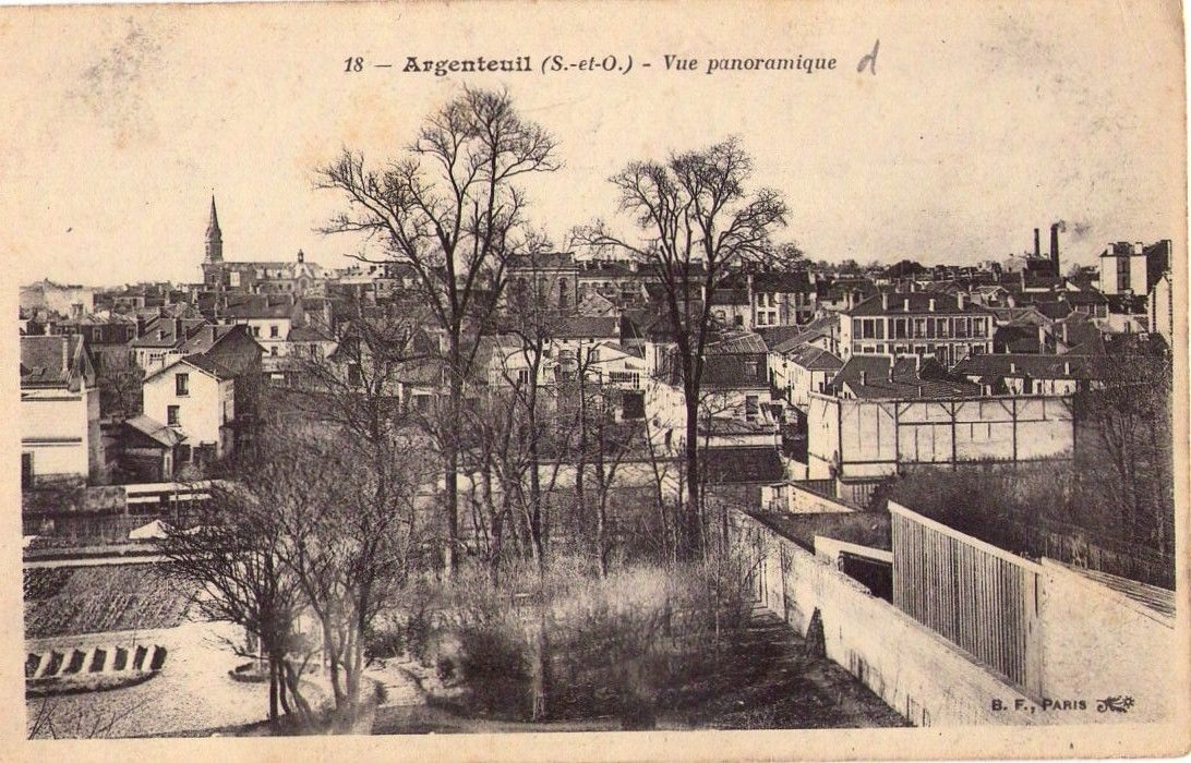 Vue d'Argenteuil vers 1910.